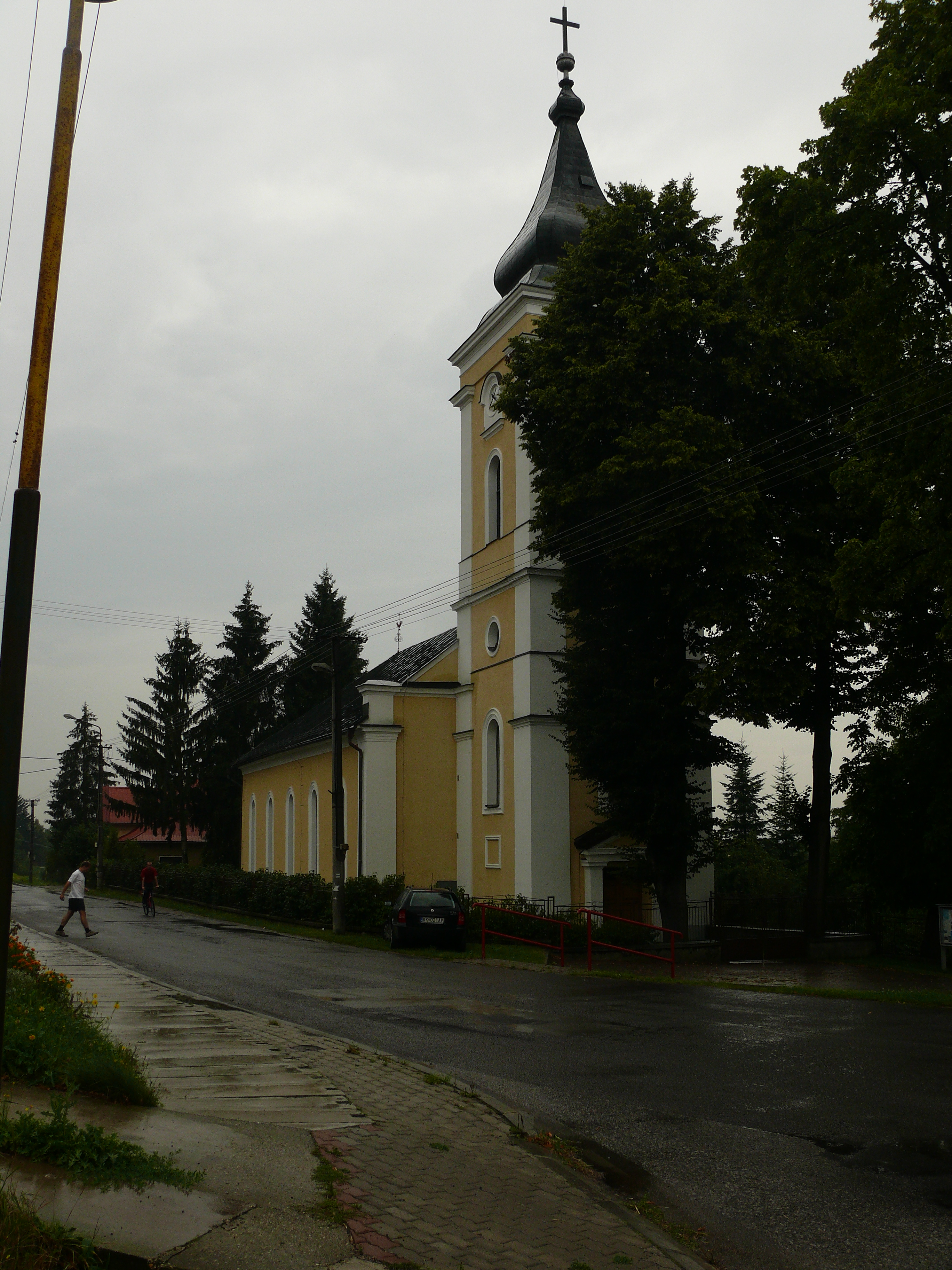 Evanjelický kostol v Očovej.